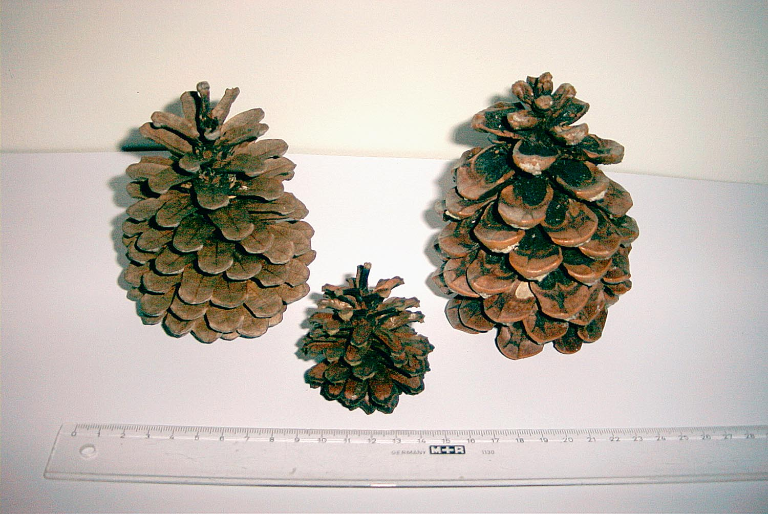 Titel: Zapfen von Pinus halepensis, P. mugo und P. pinea. Bildautor: Thomas Dreger, Suhl Bildquelle: s. o. Aufnahme erstellt: 2004 Aufnahmegerät: Minolta Dimage 2330